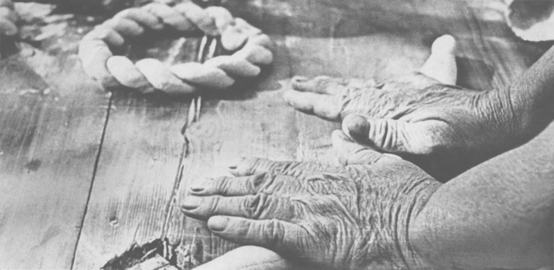 Mum Maria. Village Paskautsy 1967.